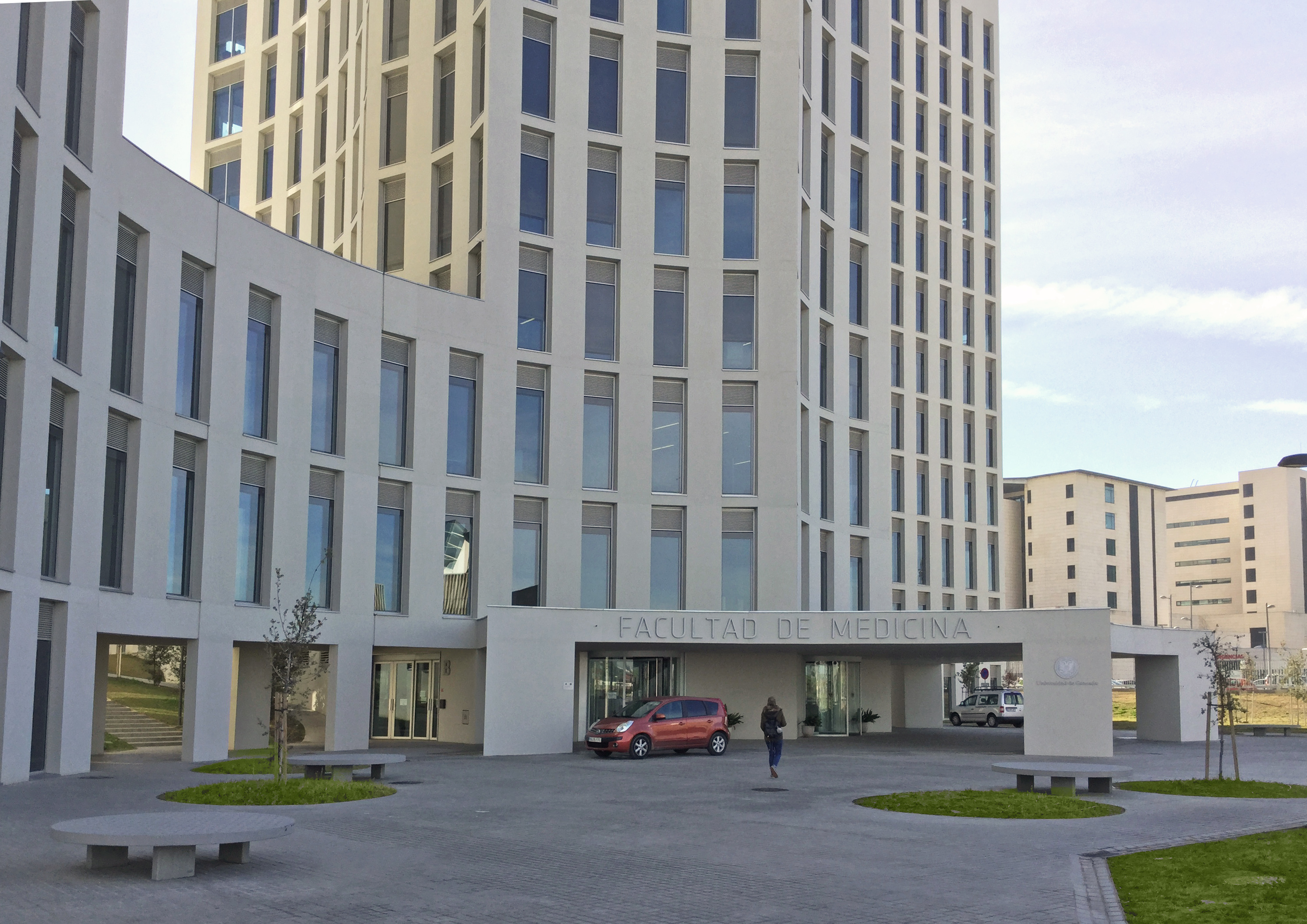 Facultad de Medicina de la Universidad de Granada en el Parque Tecnológico de la Salud de Granada.